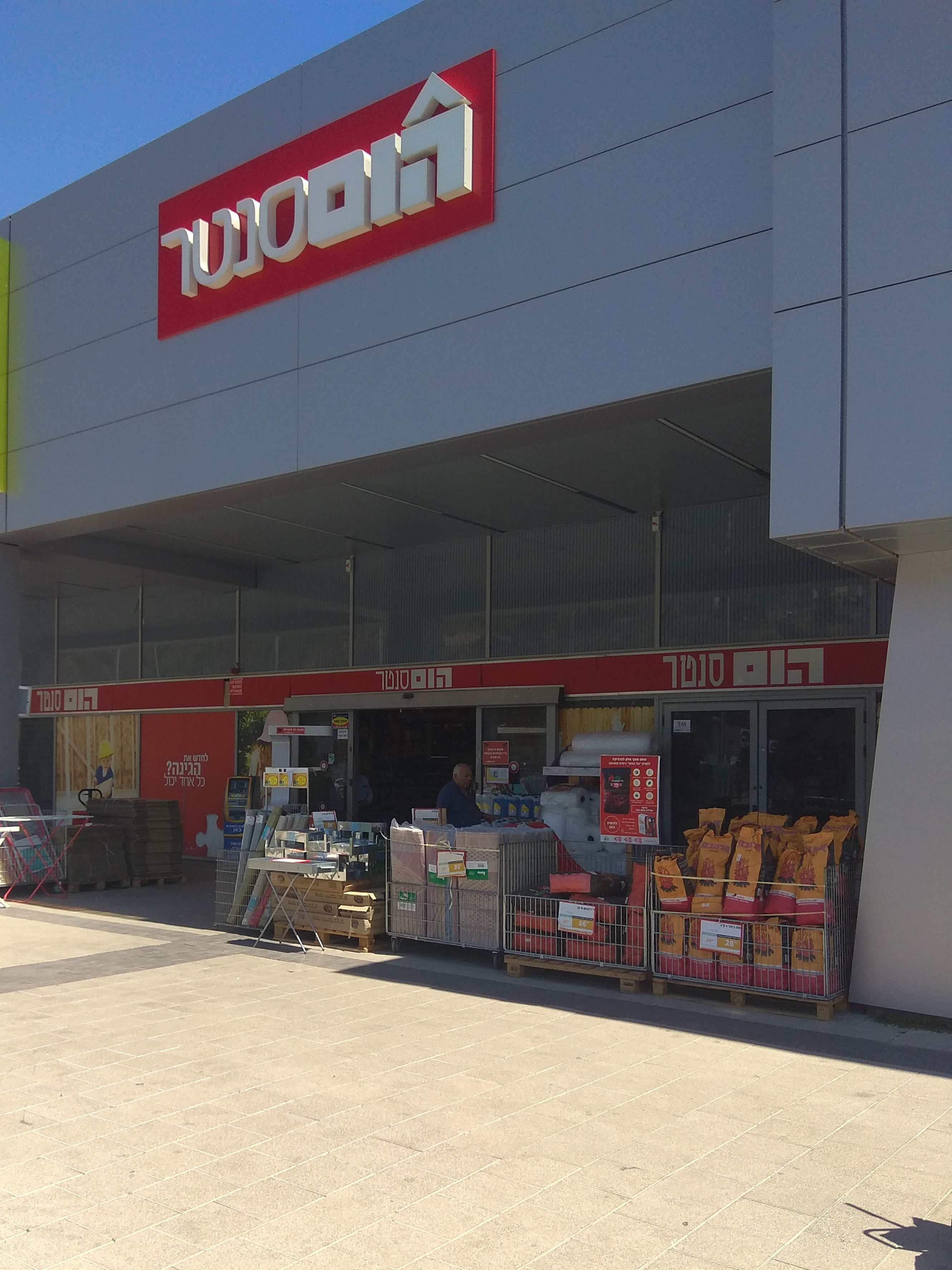 סניף של הום סנטר